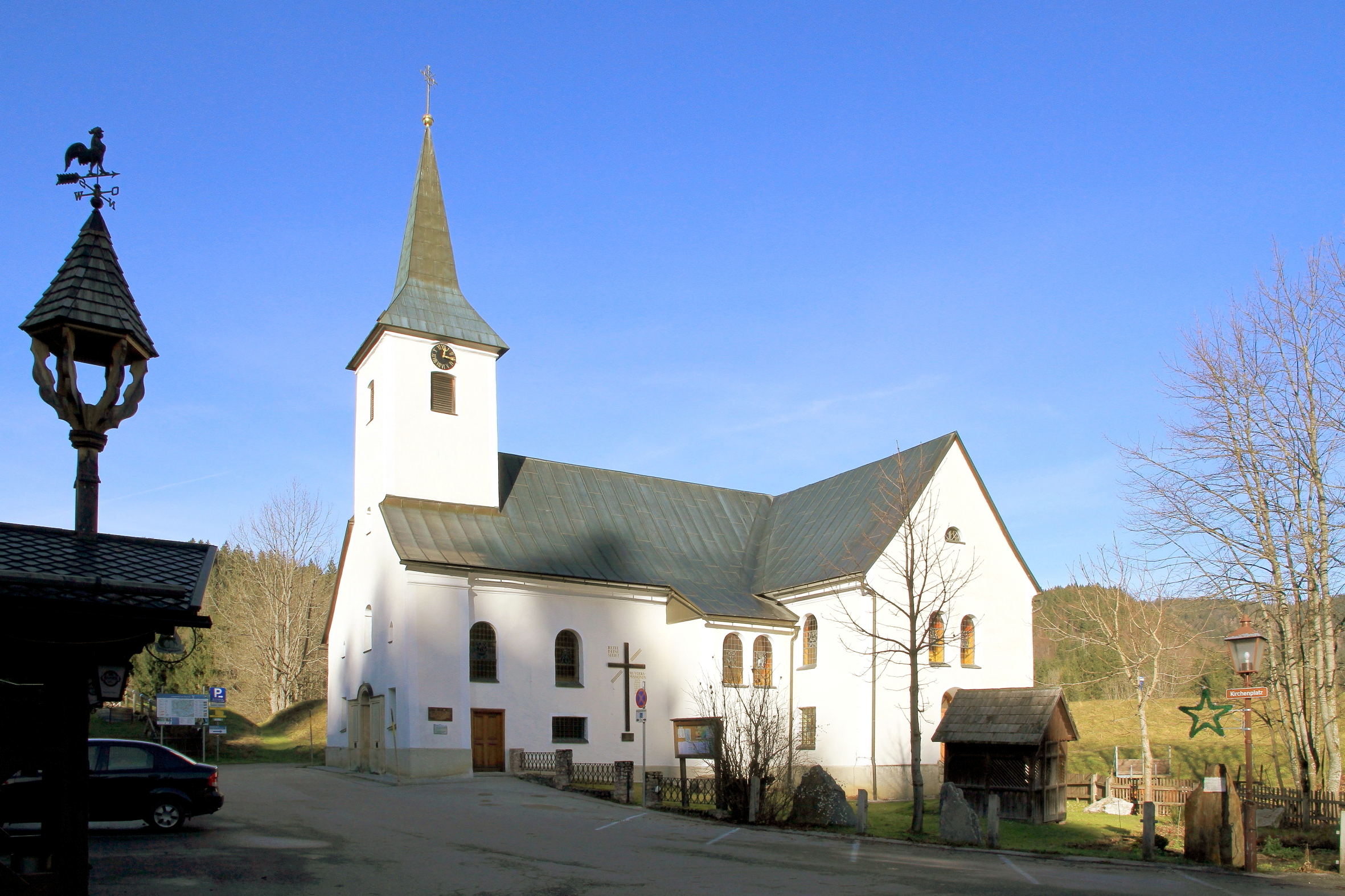 Pfarrkirche hl. Leonhard in Lackenhof, ein Ortsteil der niederösterreichischen Marktgemeinde Gaming. Ein Josephinischer Saalbau aus dem Jahr 1786 mit einem eingezogenen Chor. Der schlichte Westturm sowie seitliche Anbauten stammen aus den Jahren 1821/37 und die Sakristei wurde 1957 errichtet.